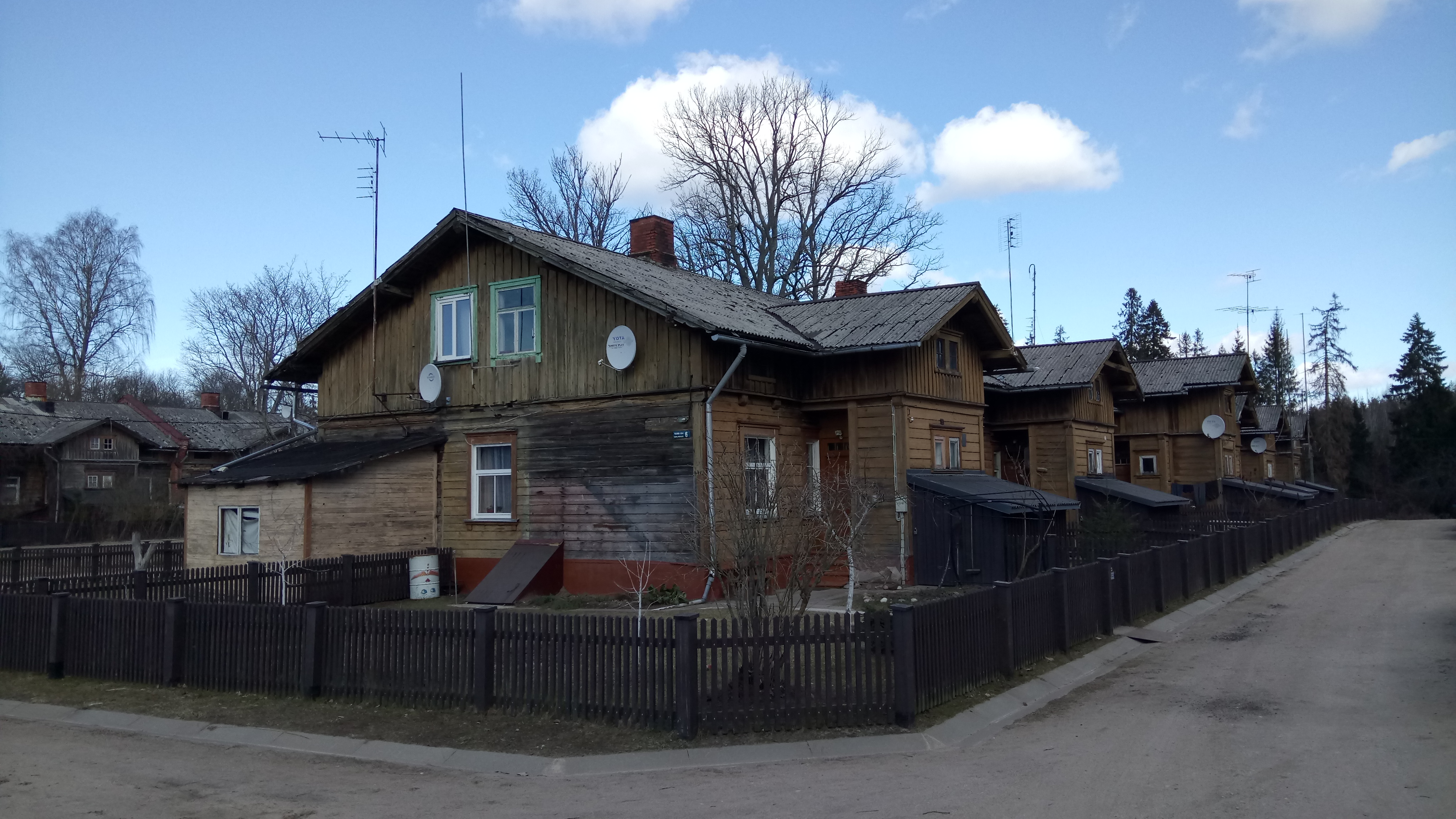 Līgatnes papīrfabrikas ciemata apbūve mūsdienās